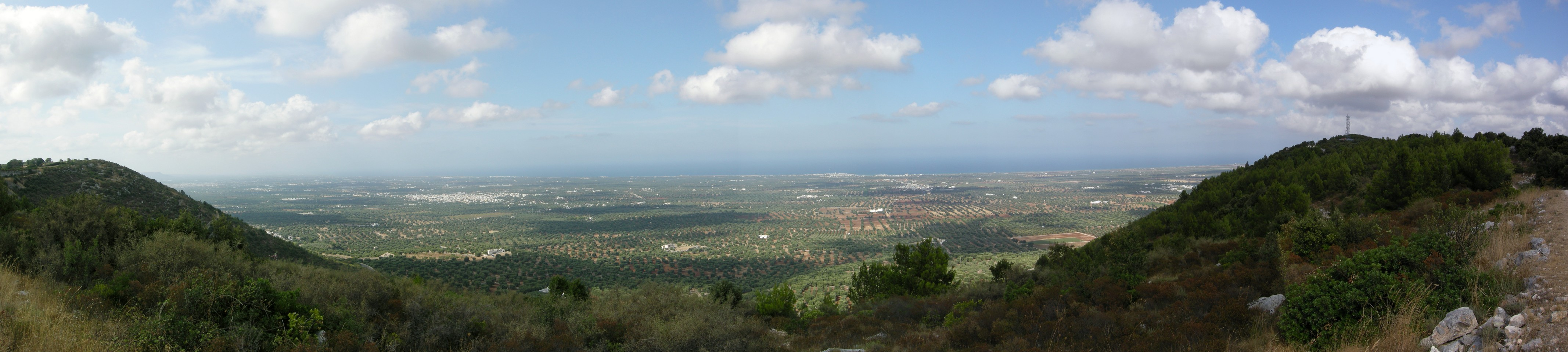 Monte "Pizzuto" - Caranna, Cisternino (Br)